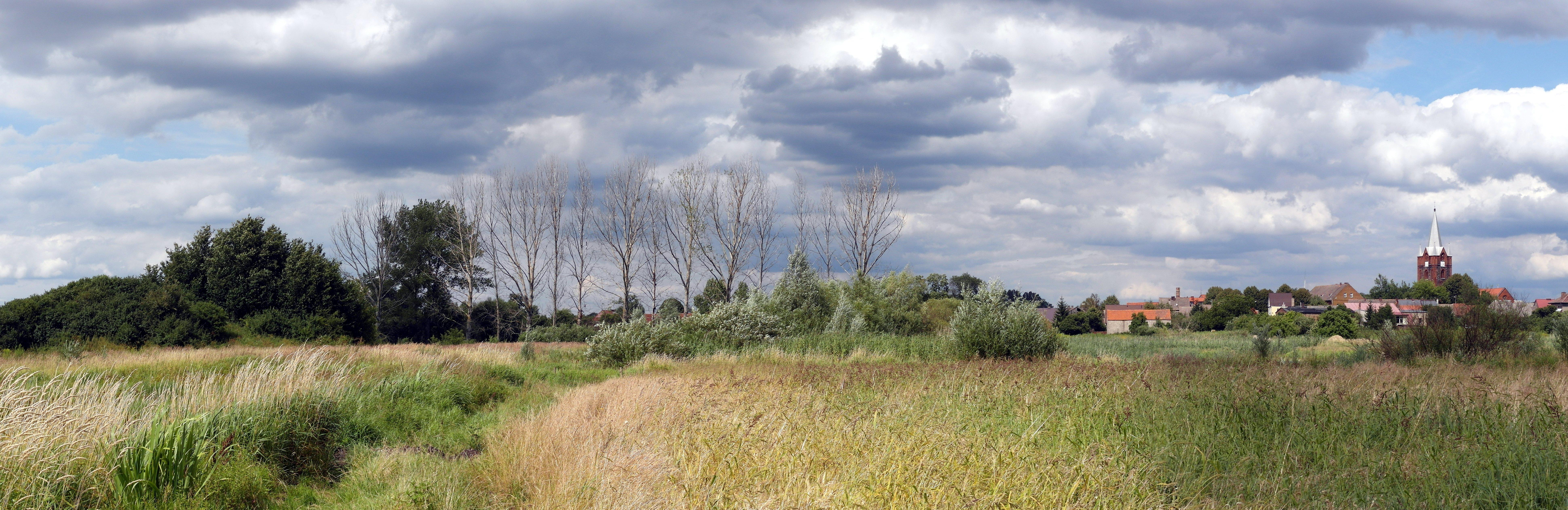 Okazała wieża kościoła św. Antoniego z Padwy w Boleszkowicach a na prawo nad domostwami widać jeszcze dach świątyni. Na lewo zakrzewione wzgórze - to pozostałość po grodzie a później zamku. W roku 2002 pod ziemią osuniętą z pagóra na szerokości około metra widziałem odcinek muru.